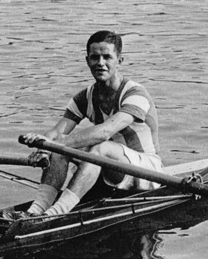 Championnat d'aviron : Saurin (Français) : [photographie de presse] / Agence Meurisse